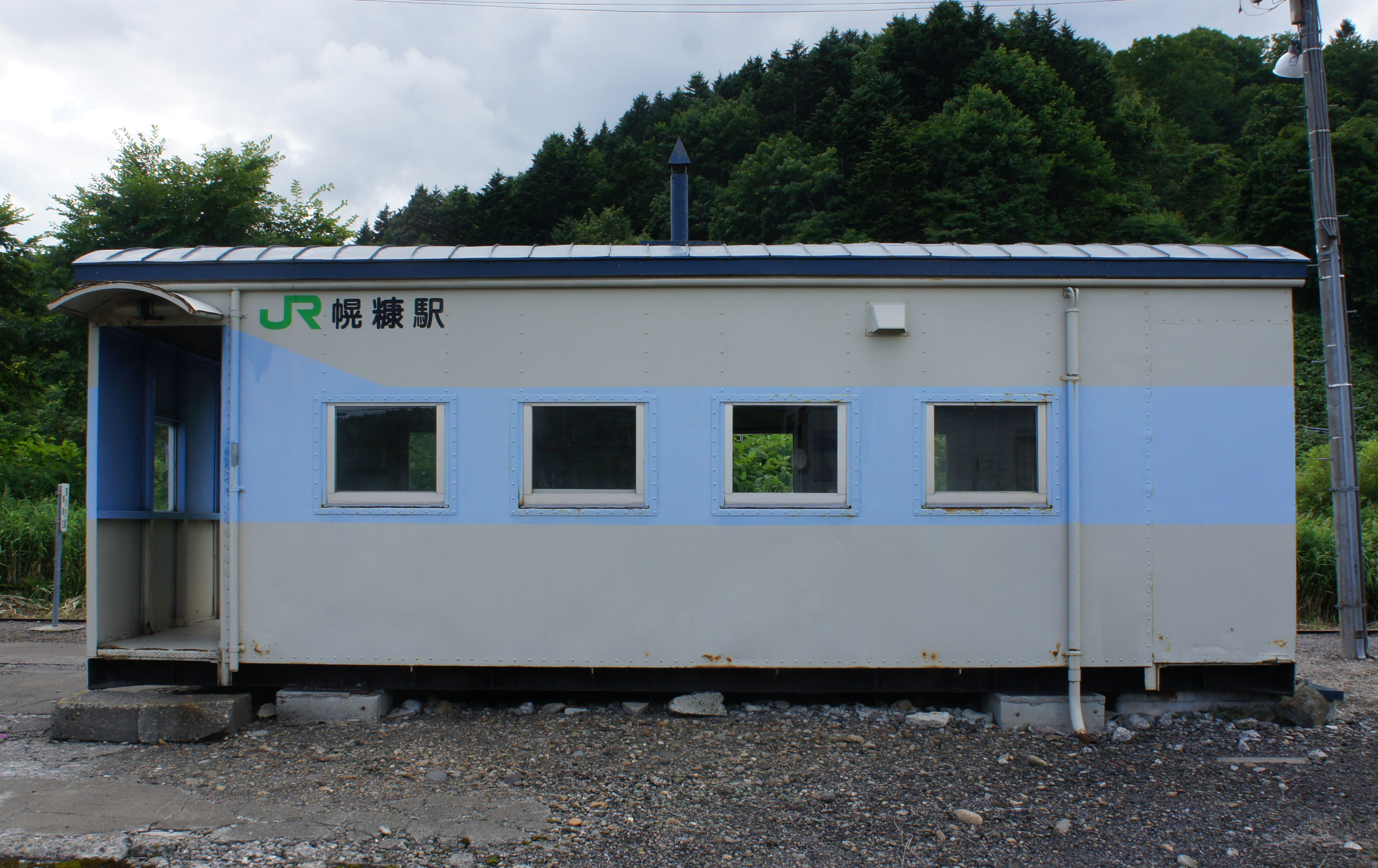 JR留萌本線・幌糠駅の駅舎